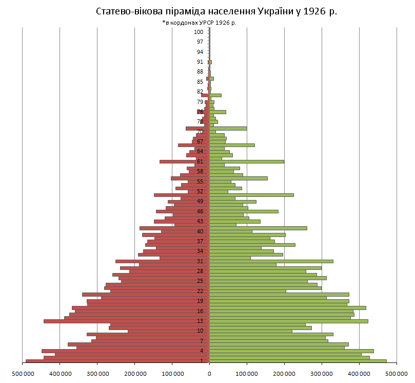 Вікова піраміда населення України у 1926 р. / Population pyramid of Ukraine in 1926